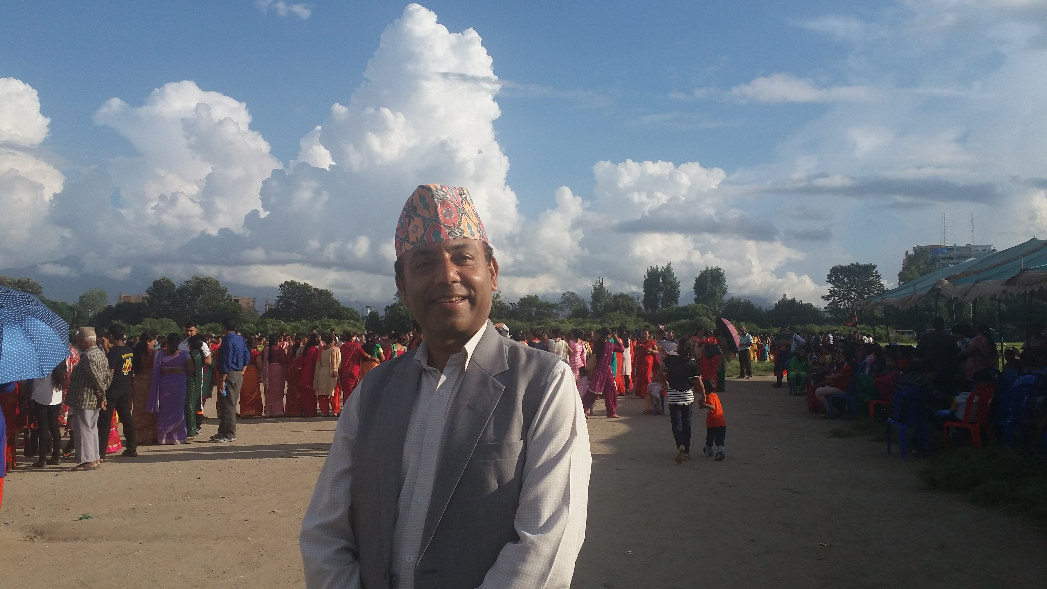 नेपाली: नेपालको सुदुरपश्चिममा प्रचलित गीतहरु गाएका यज्ञराज उपाध्याय स्थापित गायक हुन् ।